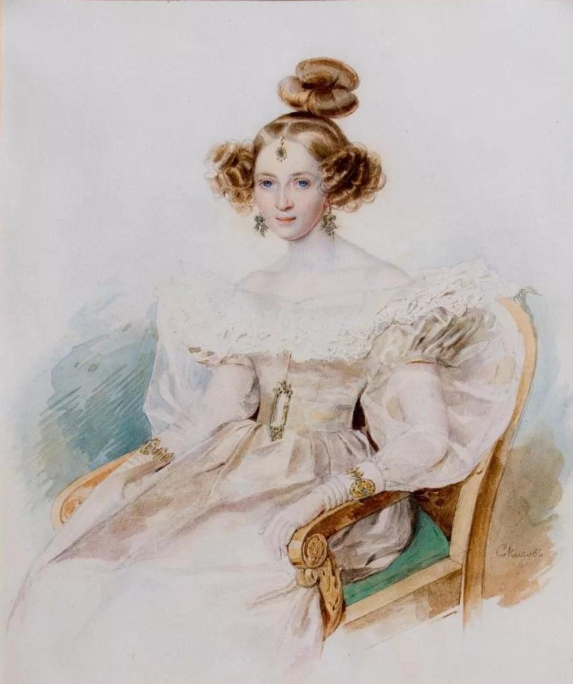 Татьяна Васильевна Васильчикова, ур. Пашкова (1793—1875)